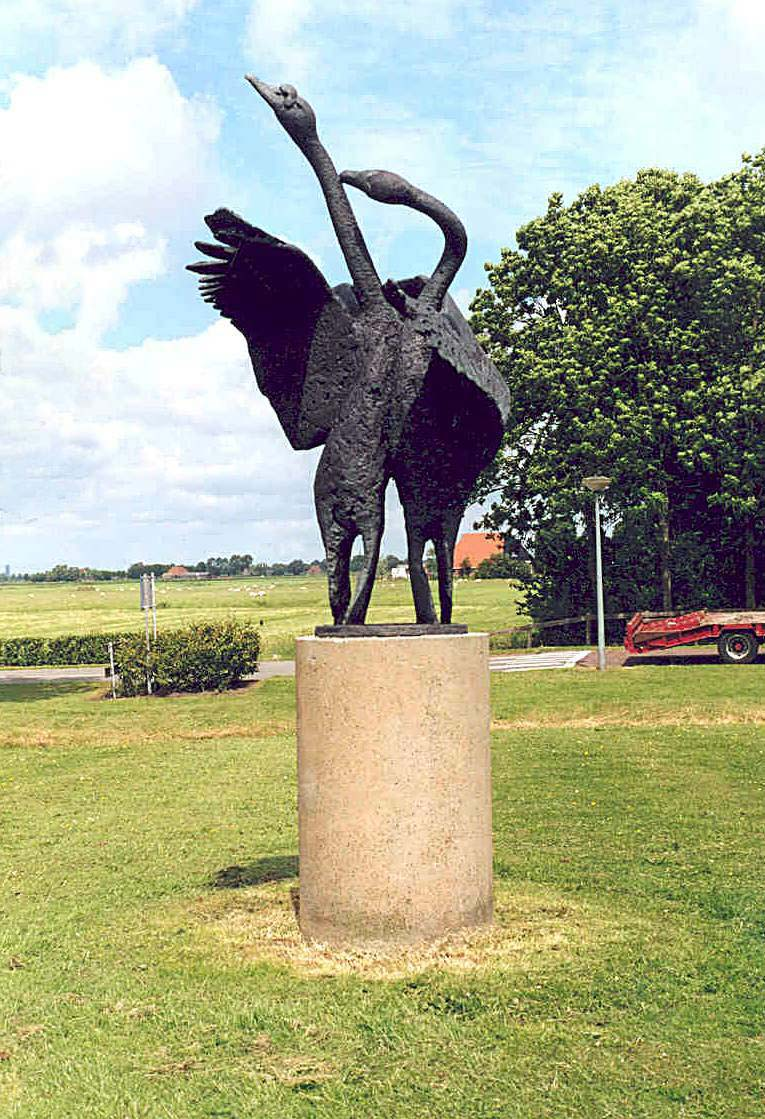 Beb Mulder, 1994, Wiuwert